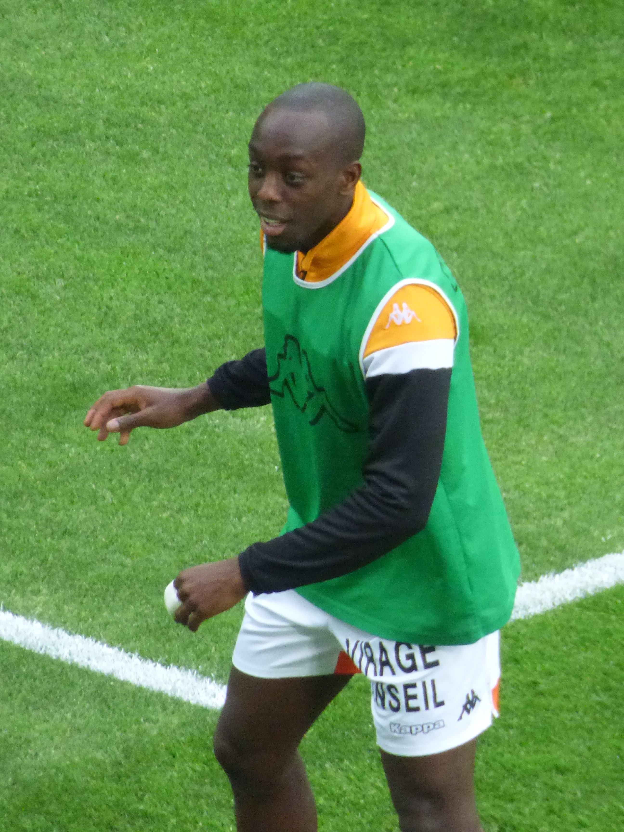 Yoane Wissa avant le match RC Lens / FC Lorient, comptant pour la 34ème journée du championnat de France de Ligue 2 de football 2018-2019, le 23 avril 2019, au Stade Bollaert-Delelis.